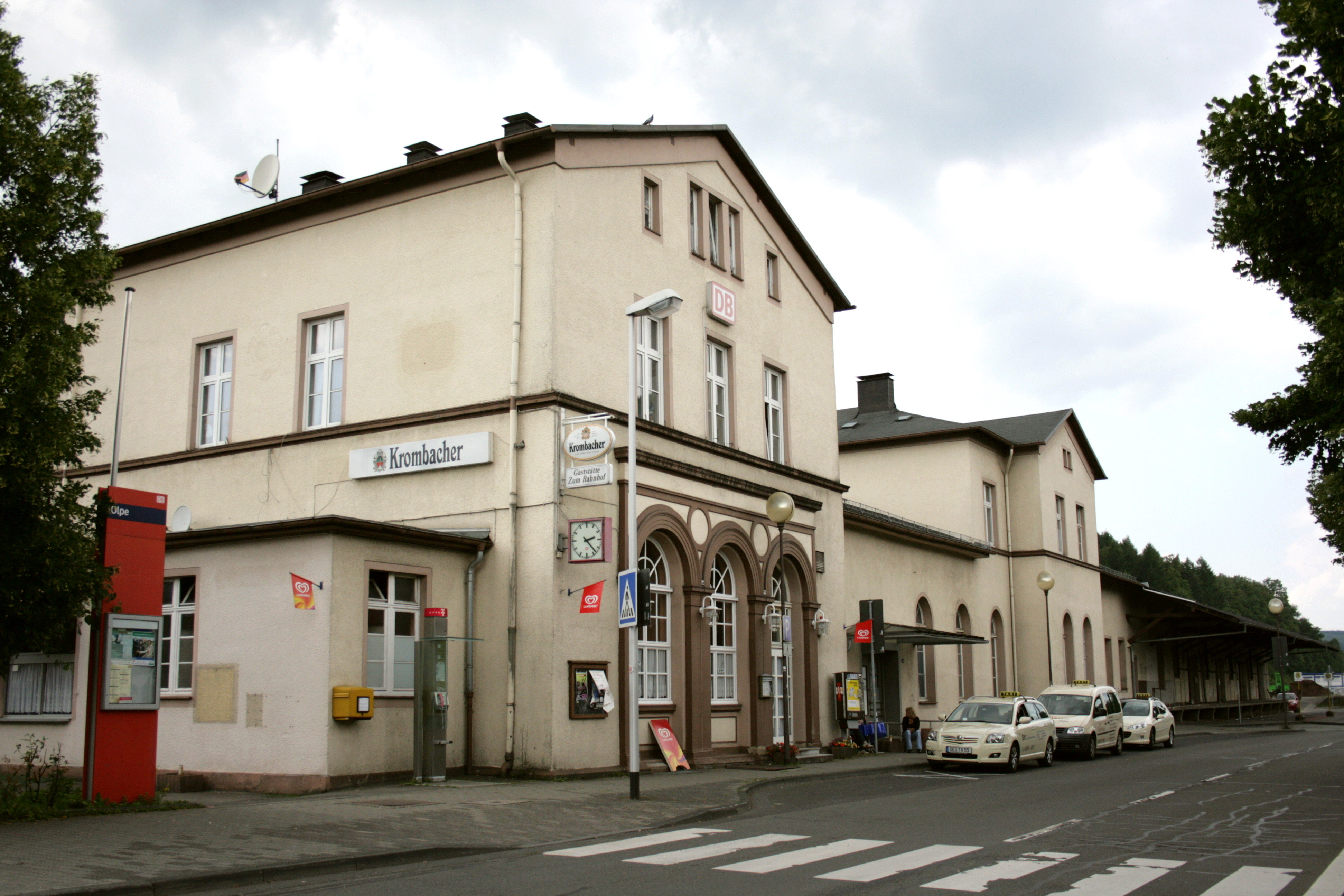 Bahnhof Olpe, Am Bahnhof in Olpe